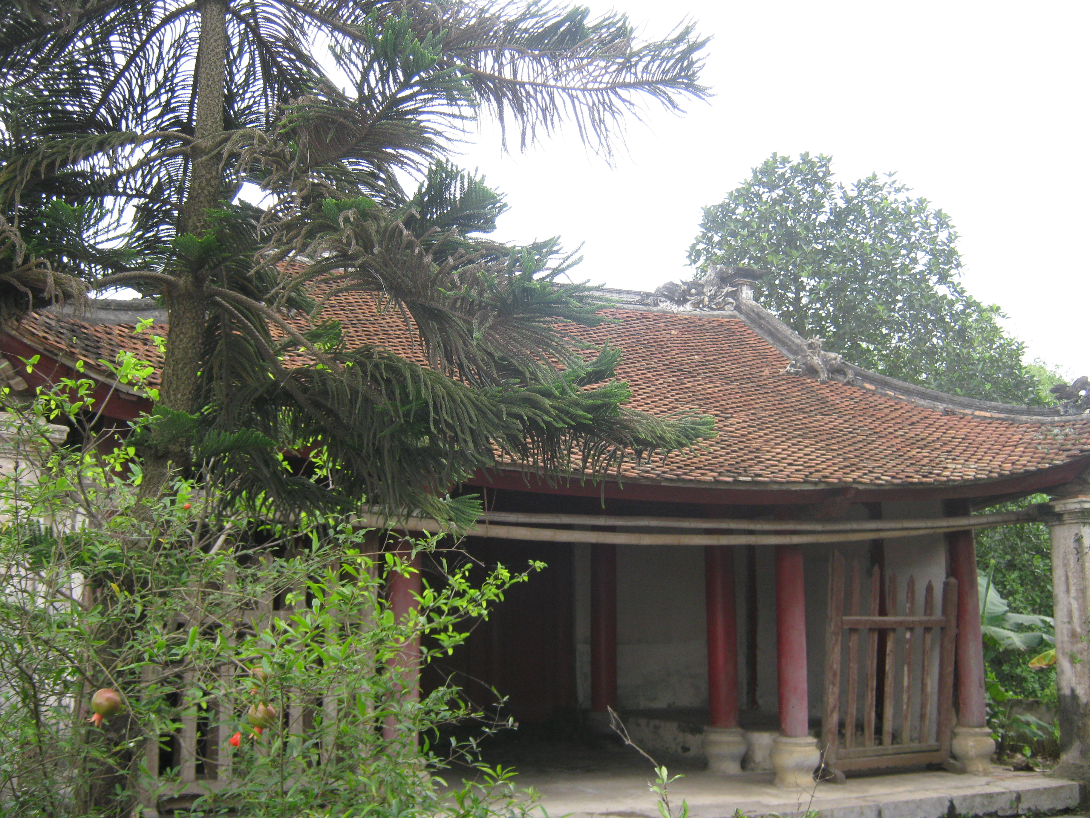 Quần thể di tích đền thờ vua Đinh Tiên Hoàng ở Nam Định